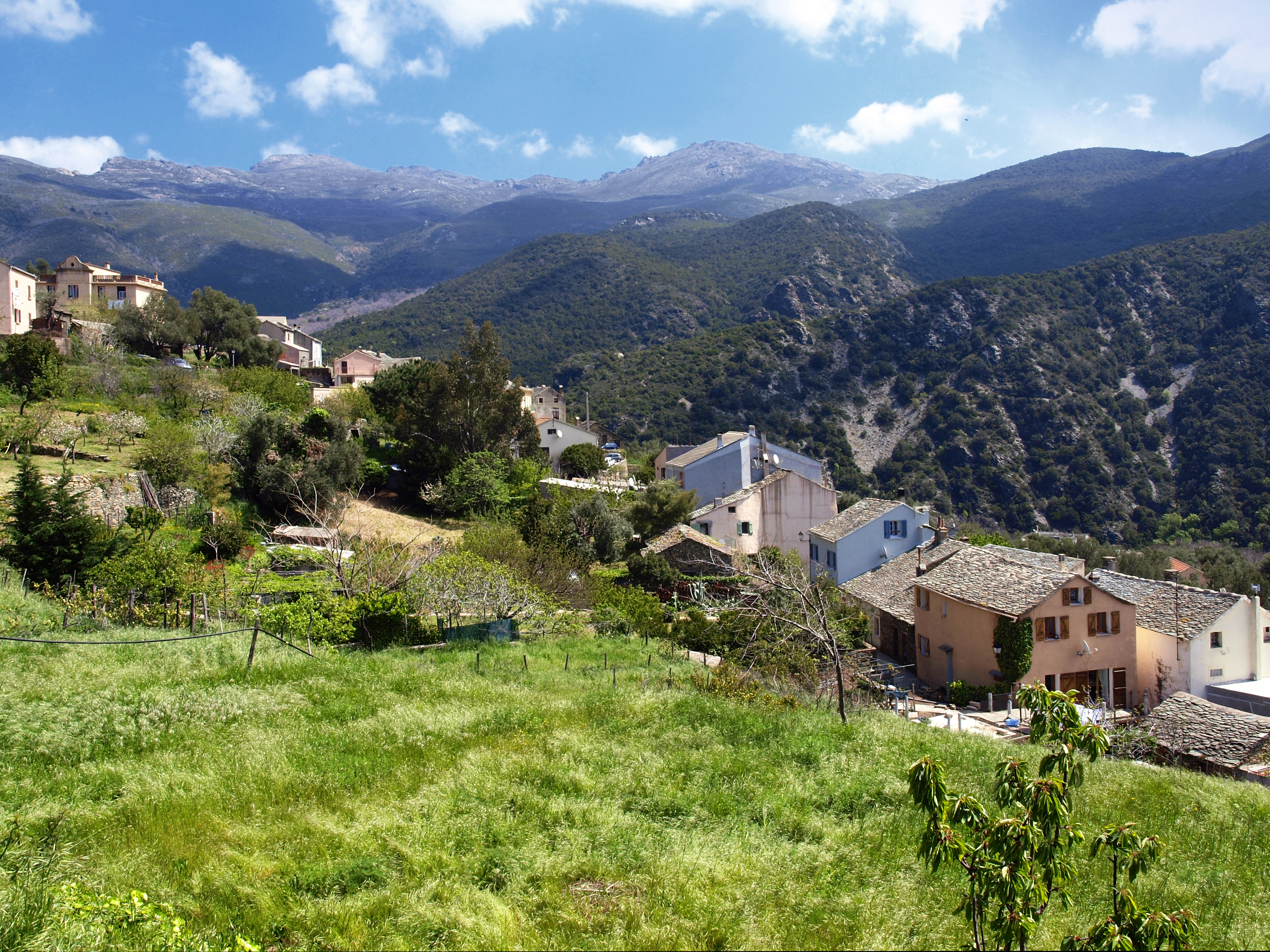 Olmeta-di-Capocorso (Corsica) - Hameau de Piazze